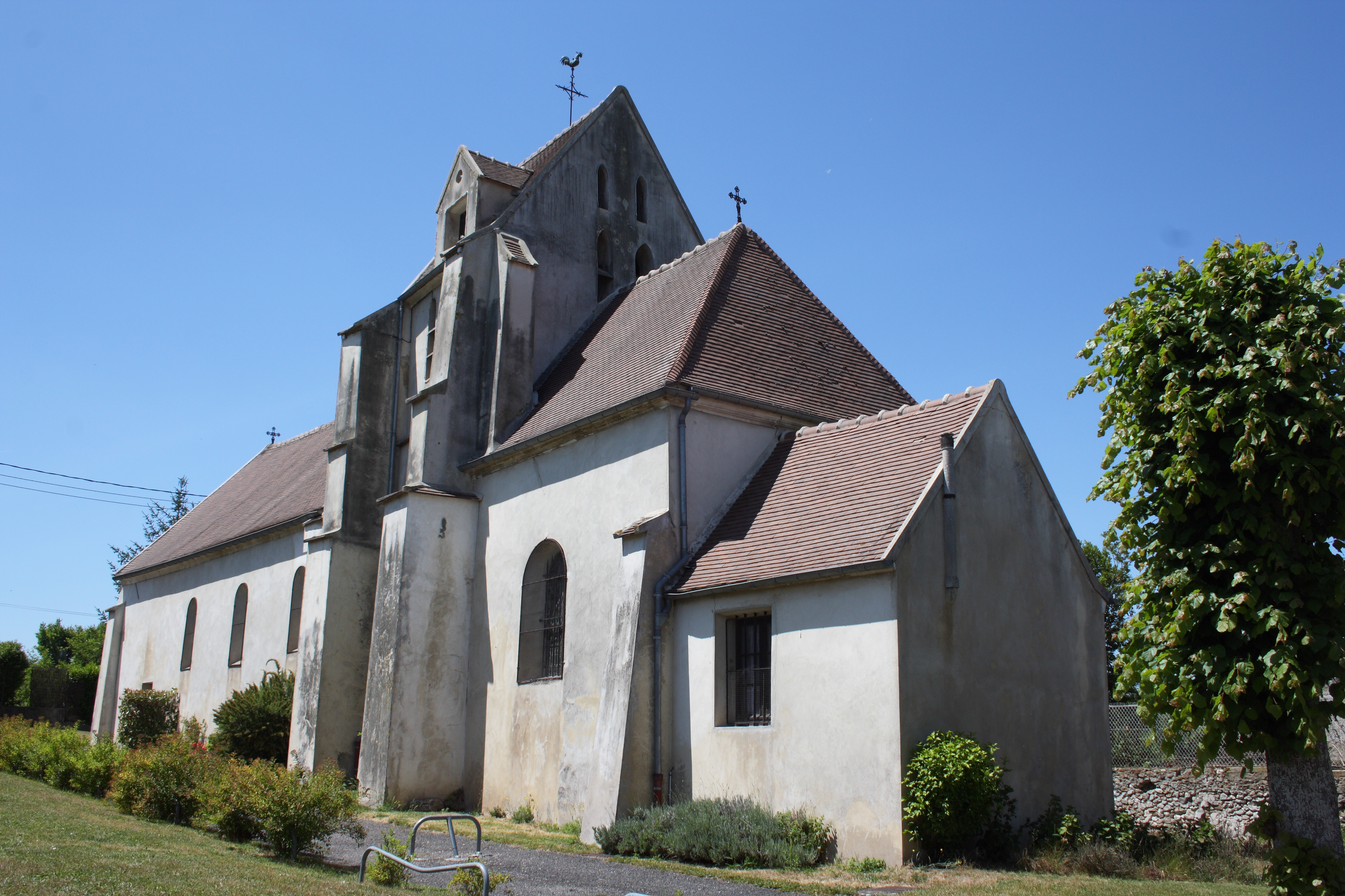 katholische Pfarrkirche Saint-Caprais in Isles-les-Meldeuses